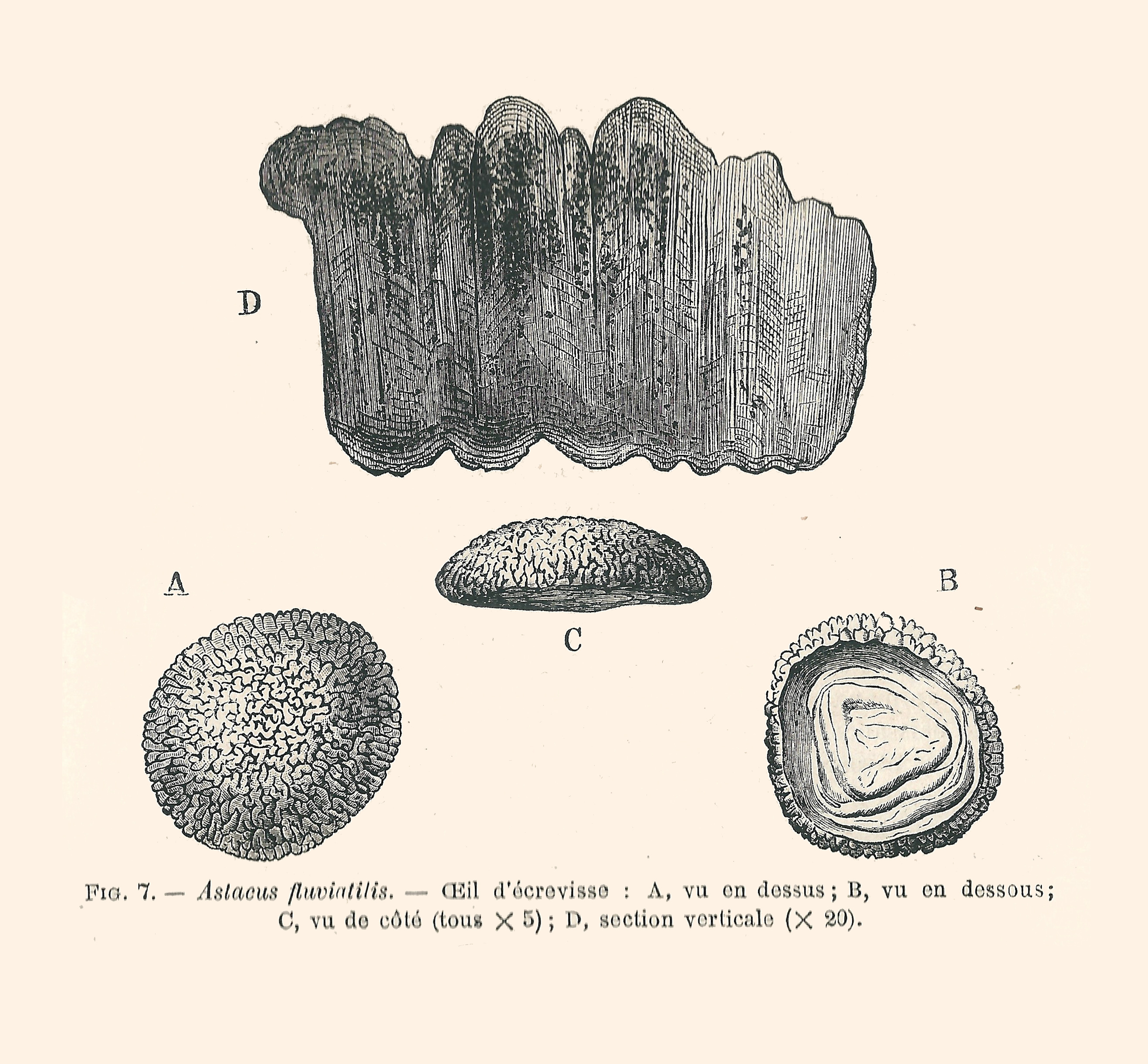 Illustration de l'ouvrage : Thomas Henry Huxley, L’Écrevisse : introduction à l'étude de la zoologie, traduit de l'anglais, Paris : Librairie Germer Baillière & Cie, 1880